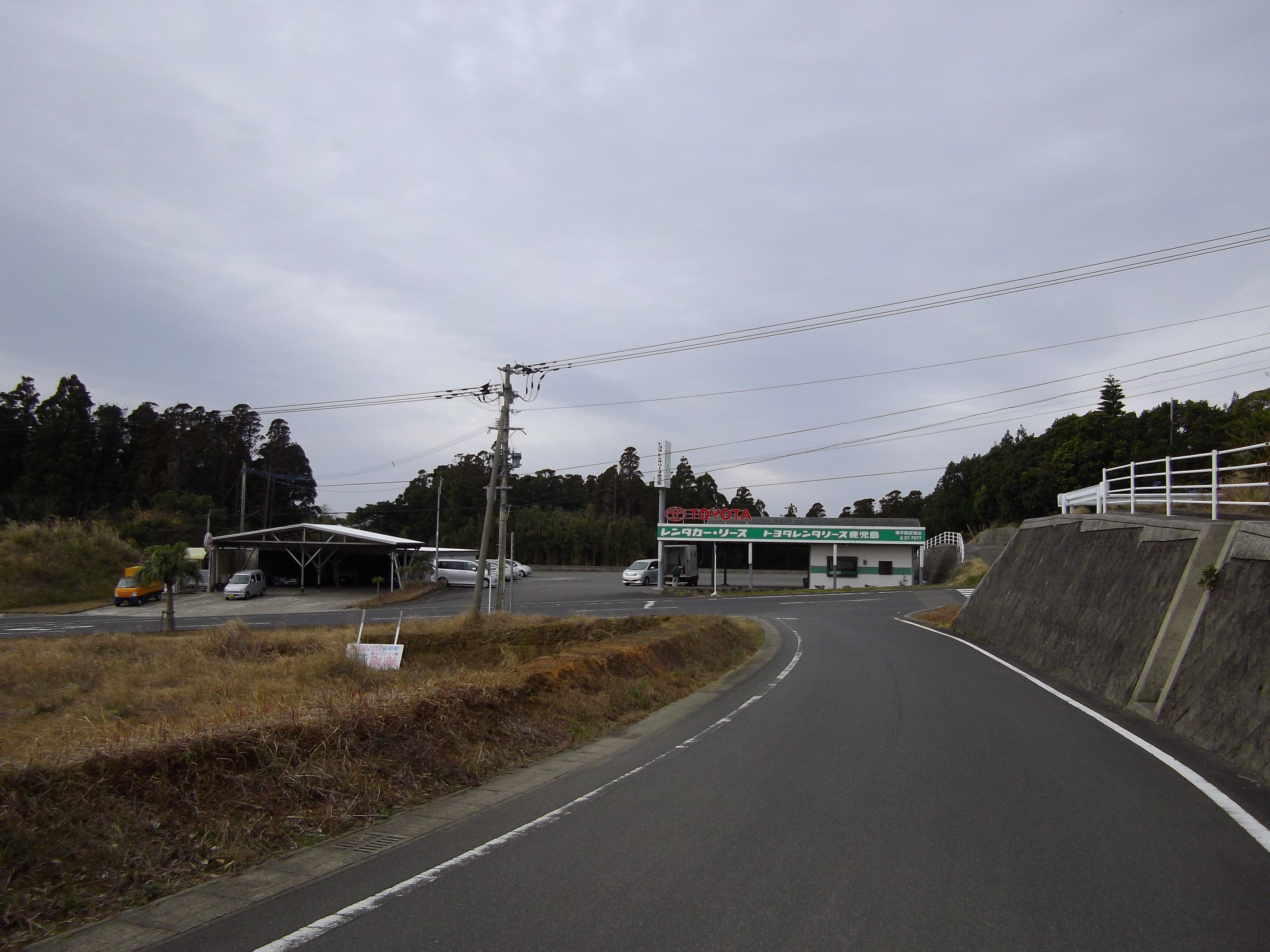 トヨタレンタカー種子島空港店